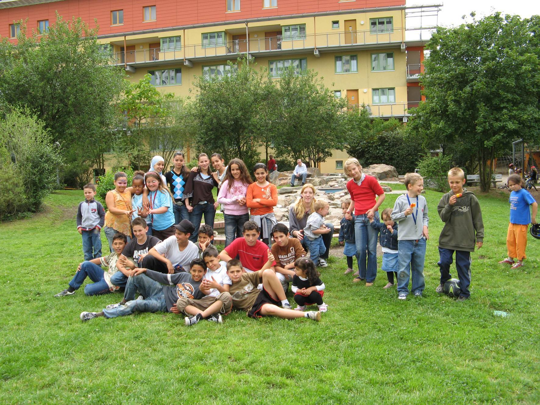 Junge Mieter in der Wohnanlage Elsa-Brändstroem-Straße